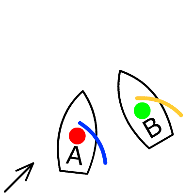 Lee vor Luv, Vorfahrtsregeln beim Segeln